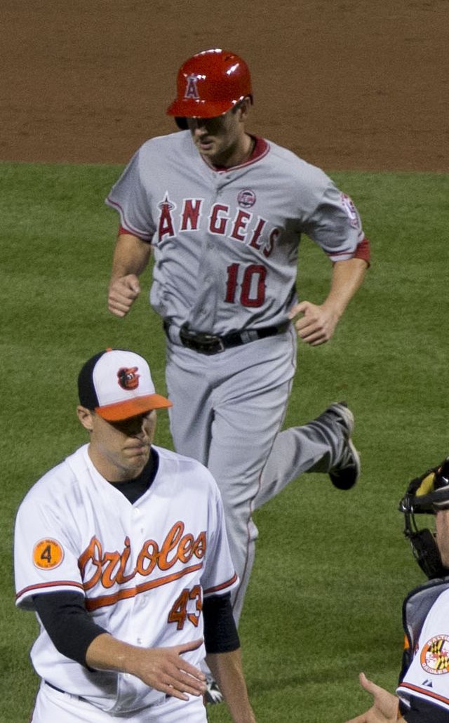 Brad Hawpe